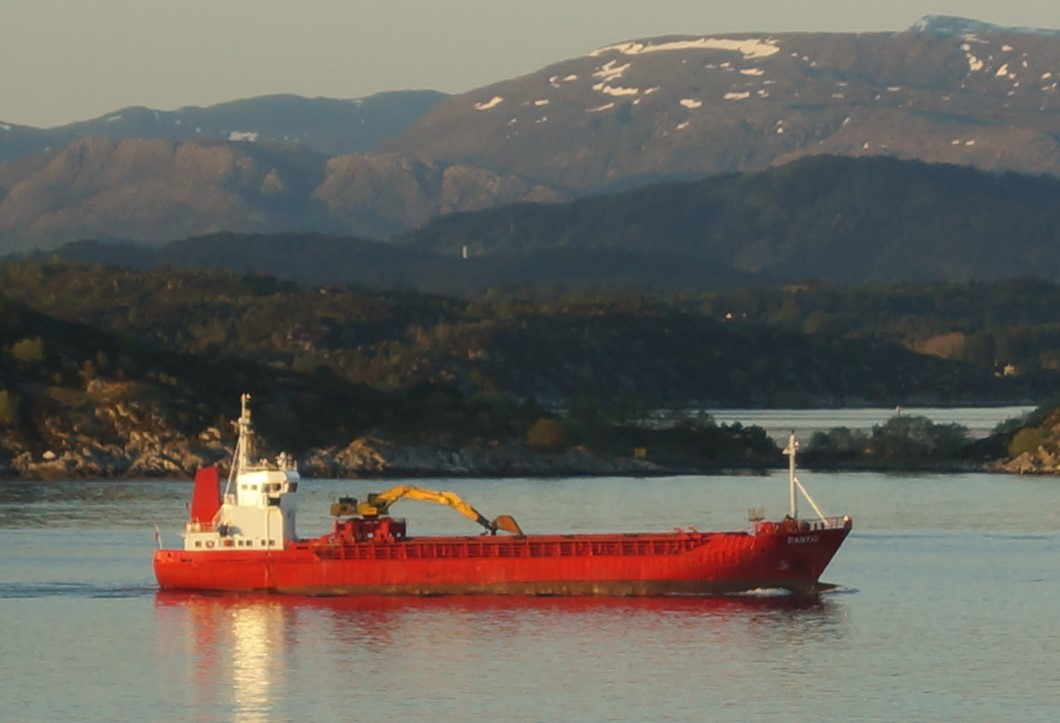 «Dantic» i Korsfjorden